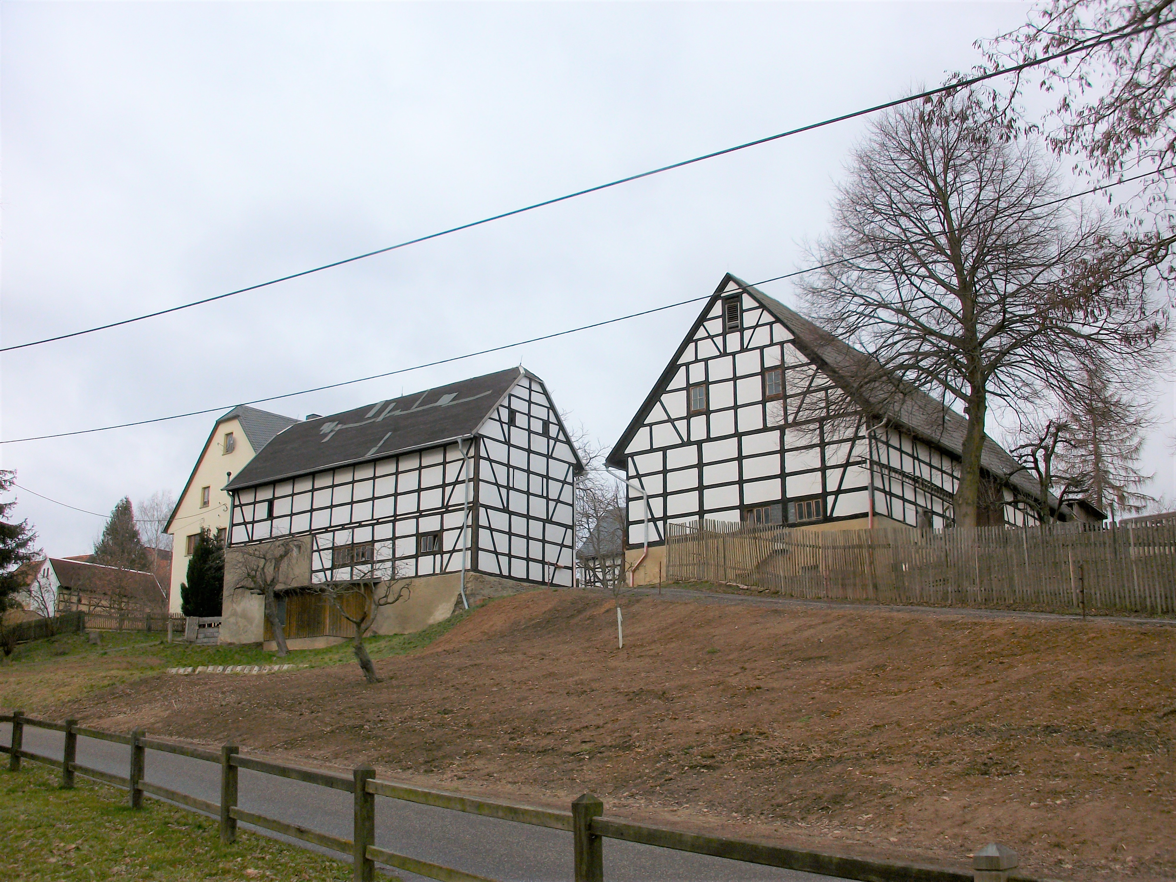 Dürrenuhlsdorf, Bergstraße 7